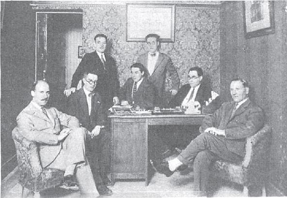 Equip de Producciones ELA, productora del film Lo más sublime (1927), i el periodista Mateo Santos Cantero (a l'esquerra)